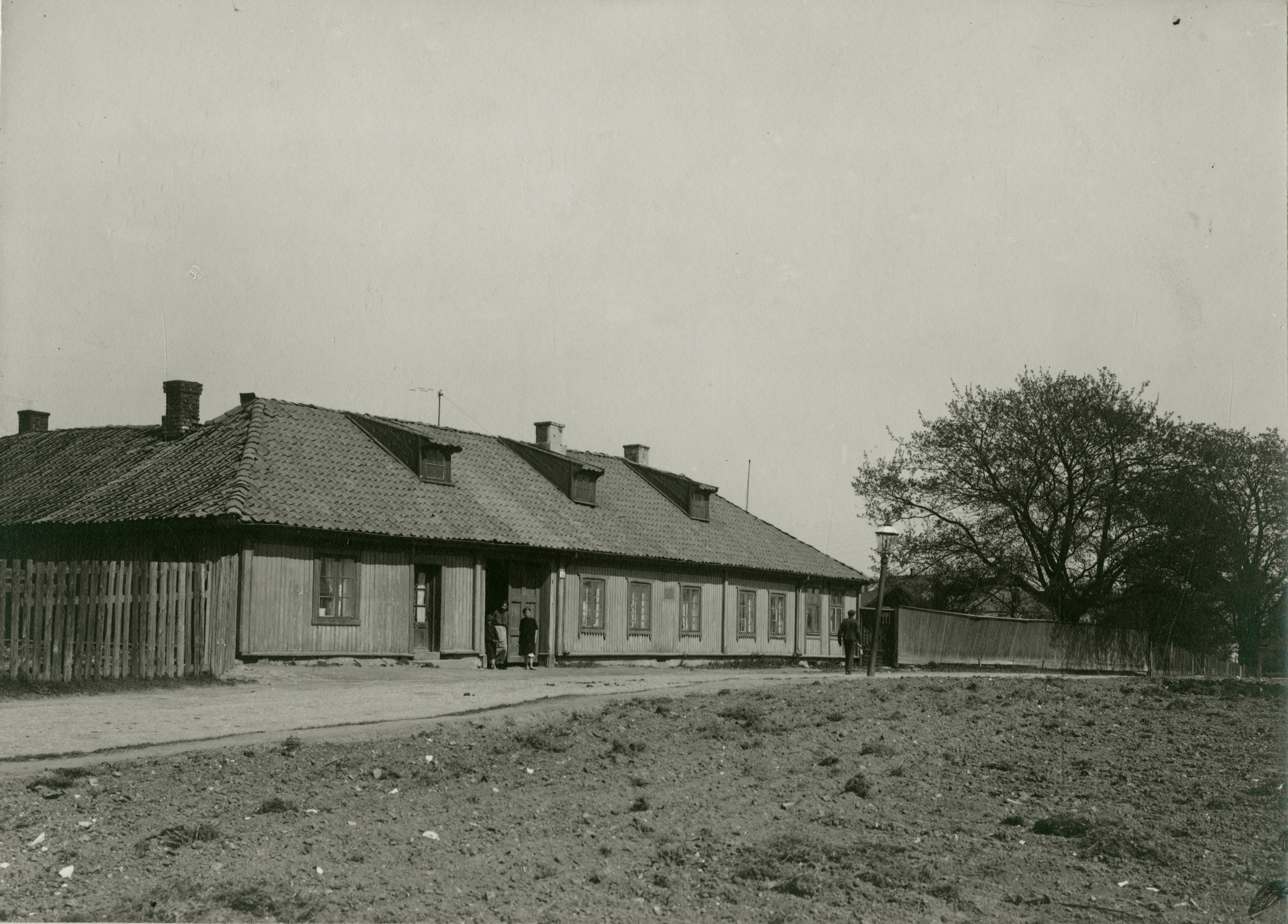 Brochmannsgate i Oslo, Oslo